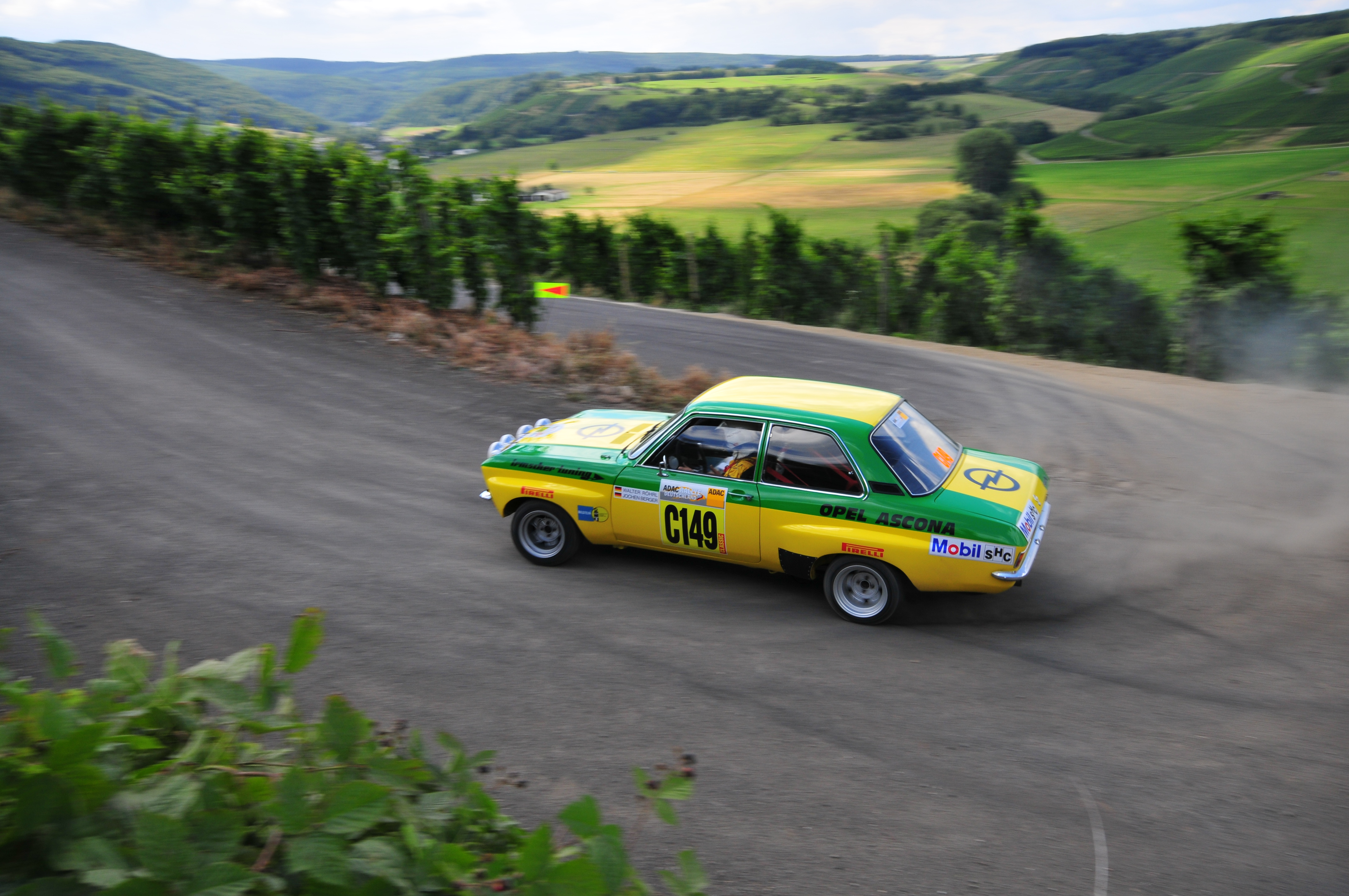 Walter Röhrl's 1974 Opel Ascona A driven during the 2008 Rallye Deutschland.